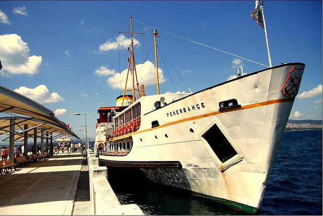 Büyükada iskelesinde Fenerbahçe vapuru.